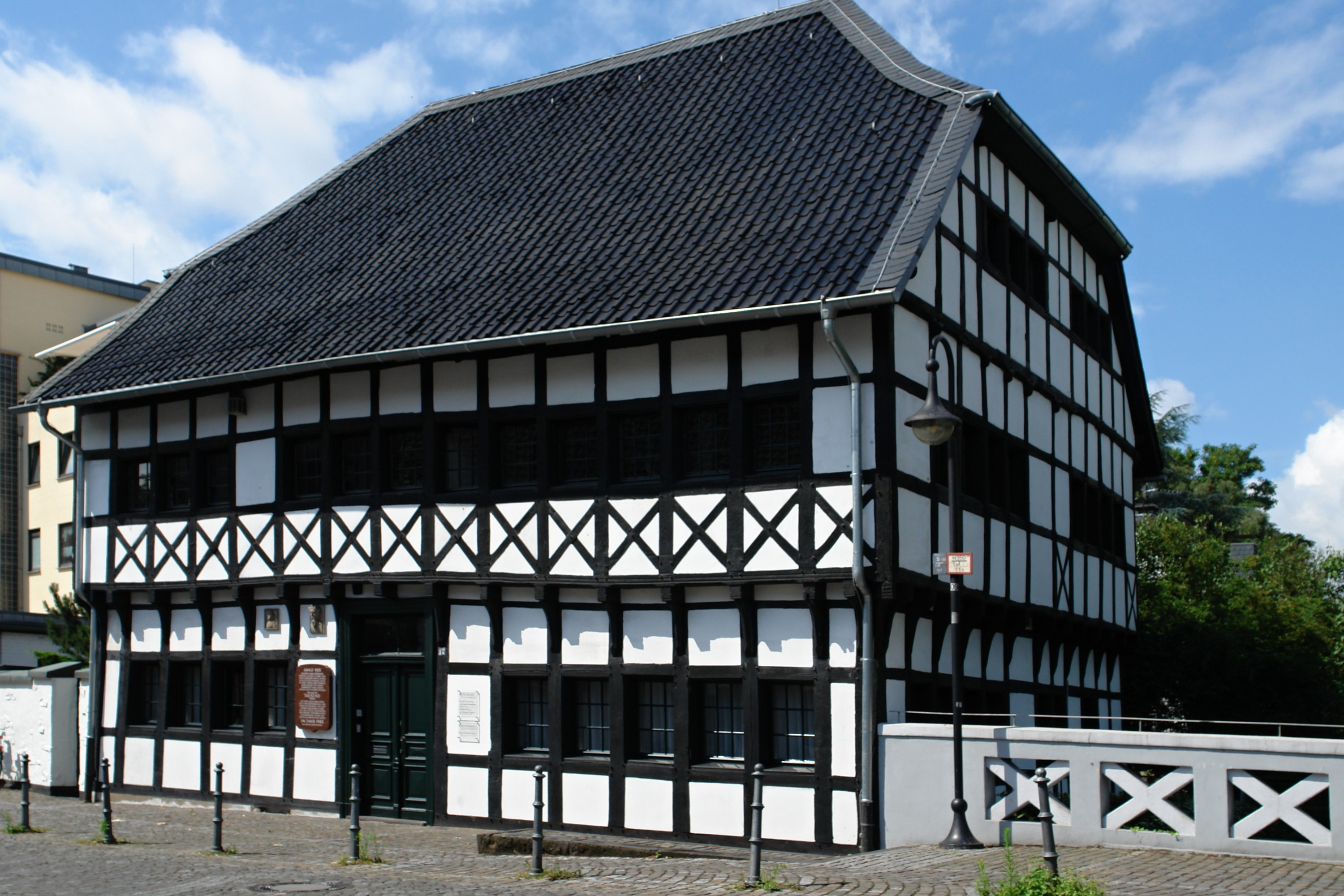 Haus auf der Bech, Fachwerkhaus, Hilden, Schwanenstr. 17, erbaut 1670/1675This is a photograph of an architectural monument.